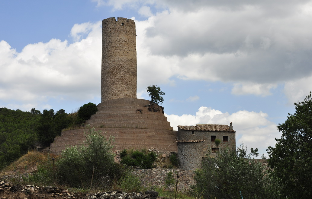 Torre del castell de Coaner